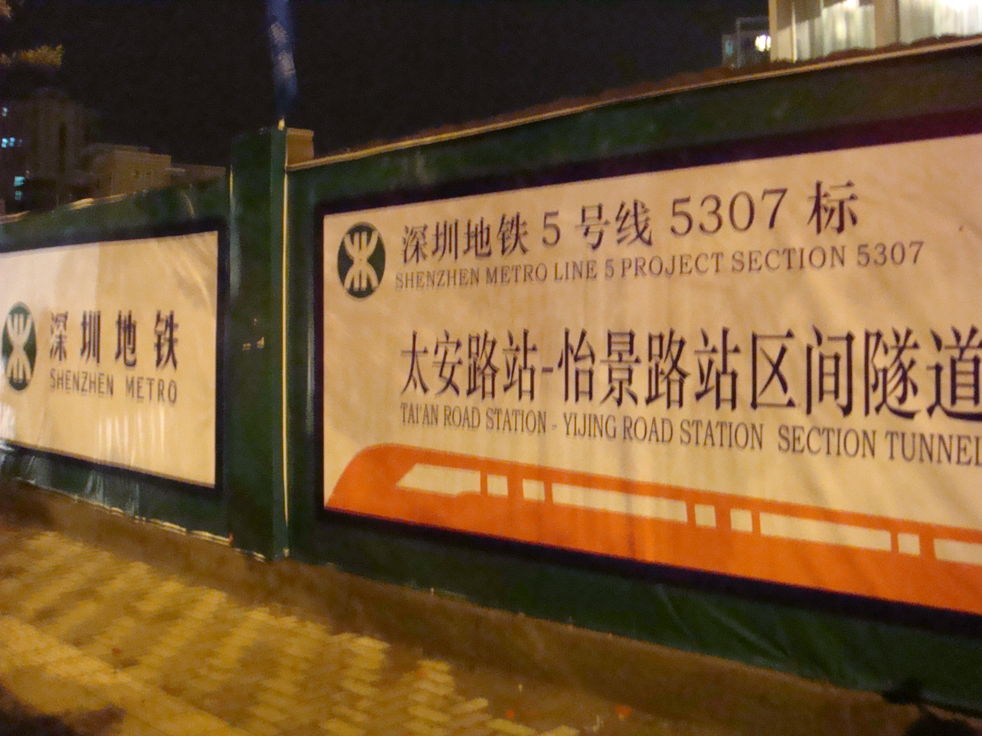 深圳地鐵5號線施工現場